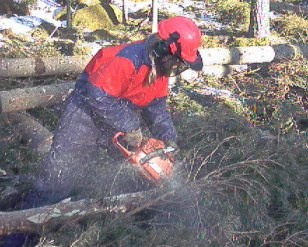 Kvisting